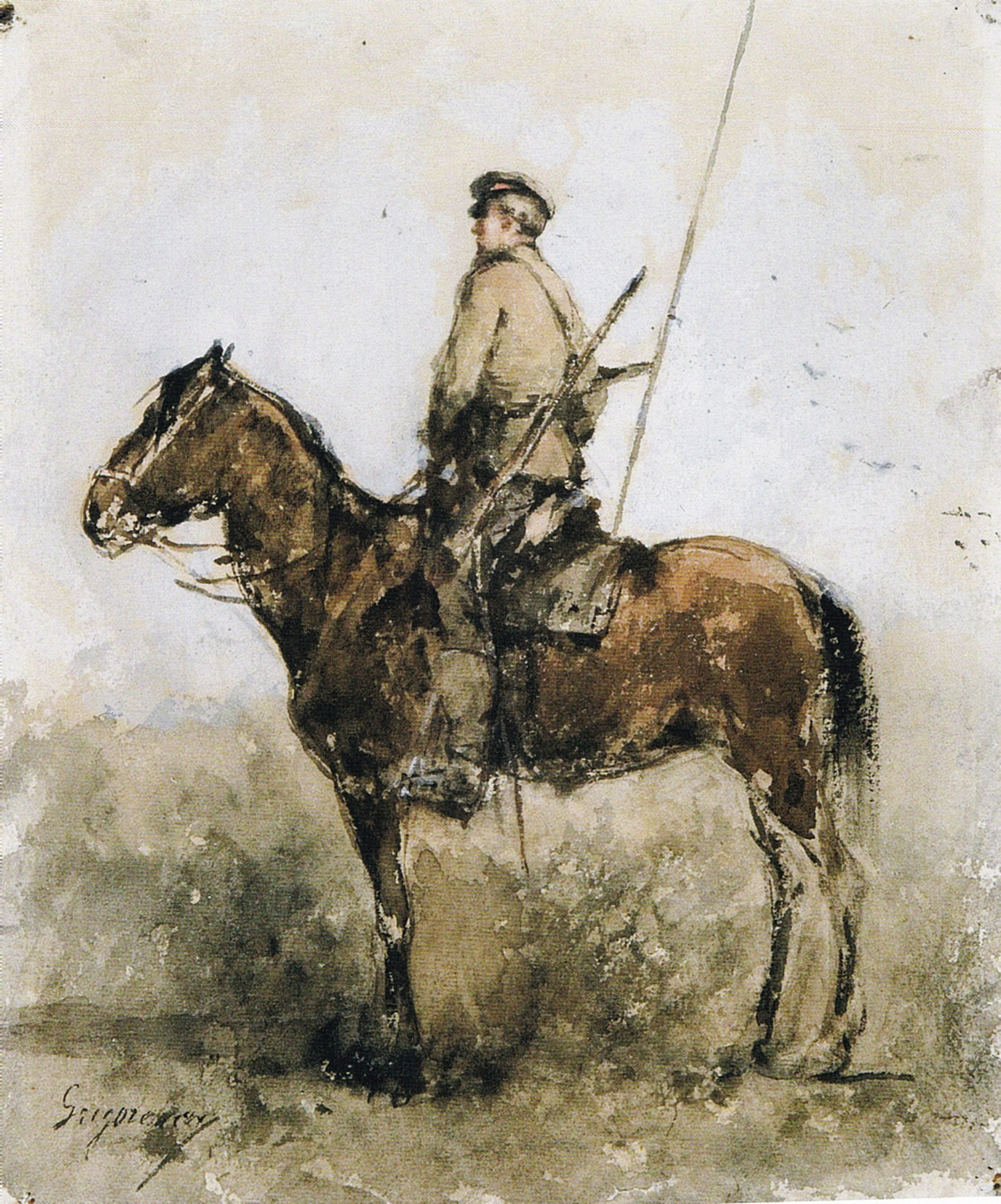 Cherchez călare, acuarelă și guașă pe hârtie manuală, semnat stanga cu negru: Grigorescu - Cabinetul de Desene și Gravuri al Muzeului Național de Artă al României.